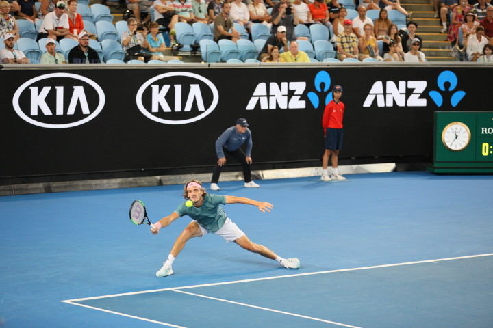 2019 Australian Open